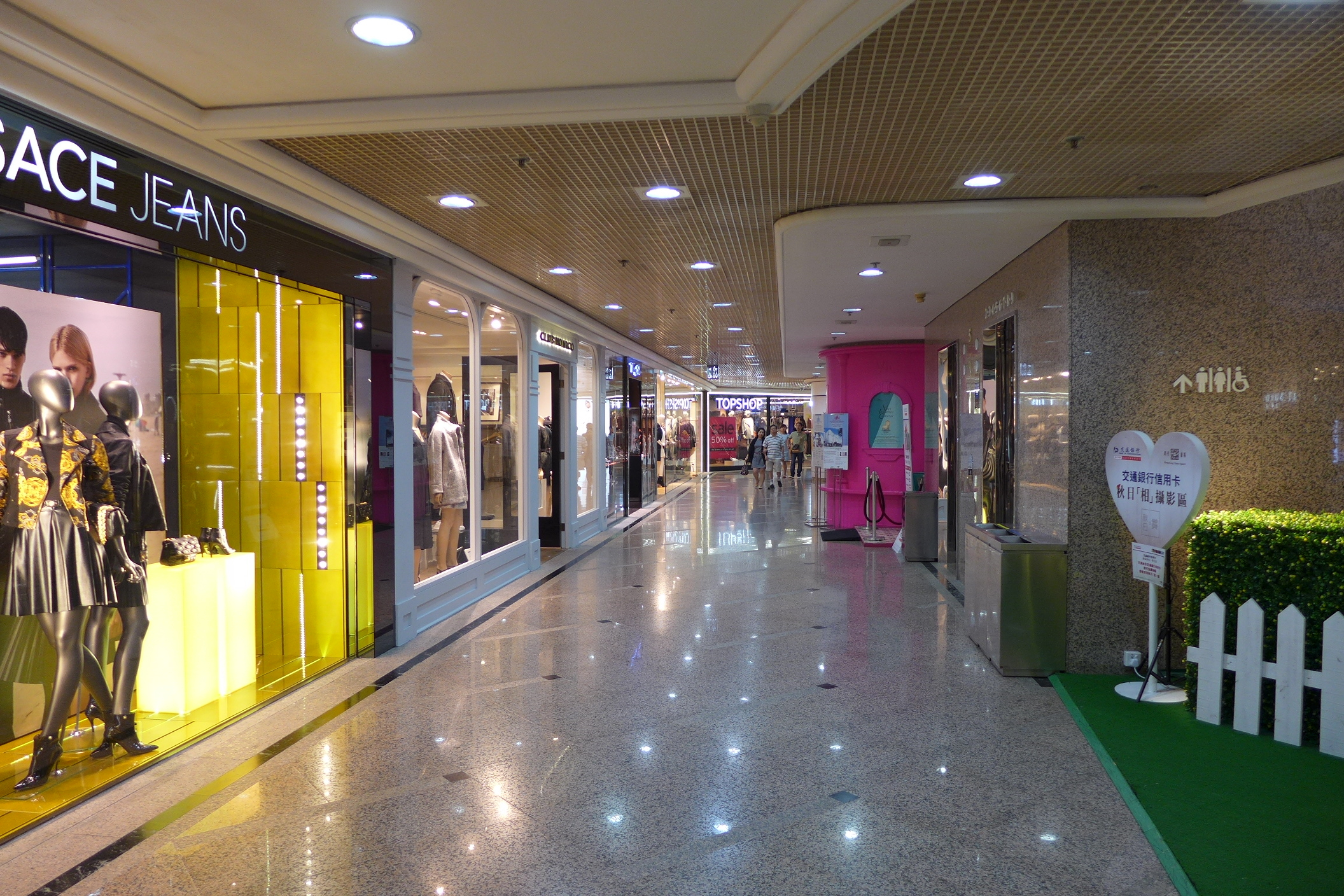 Times Square Level 5 shops